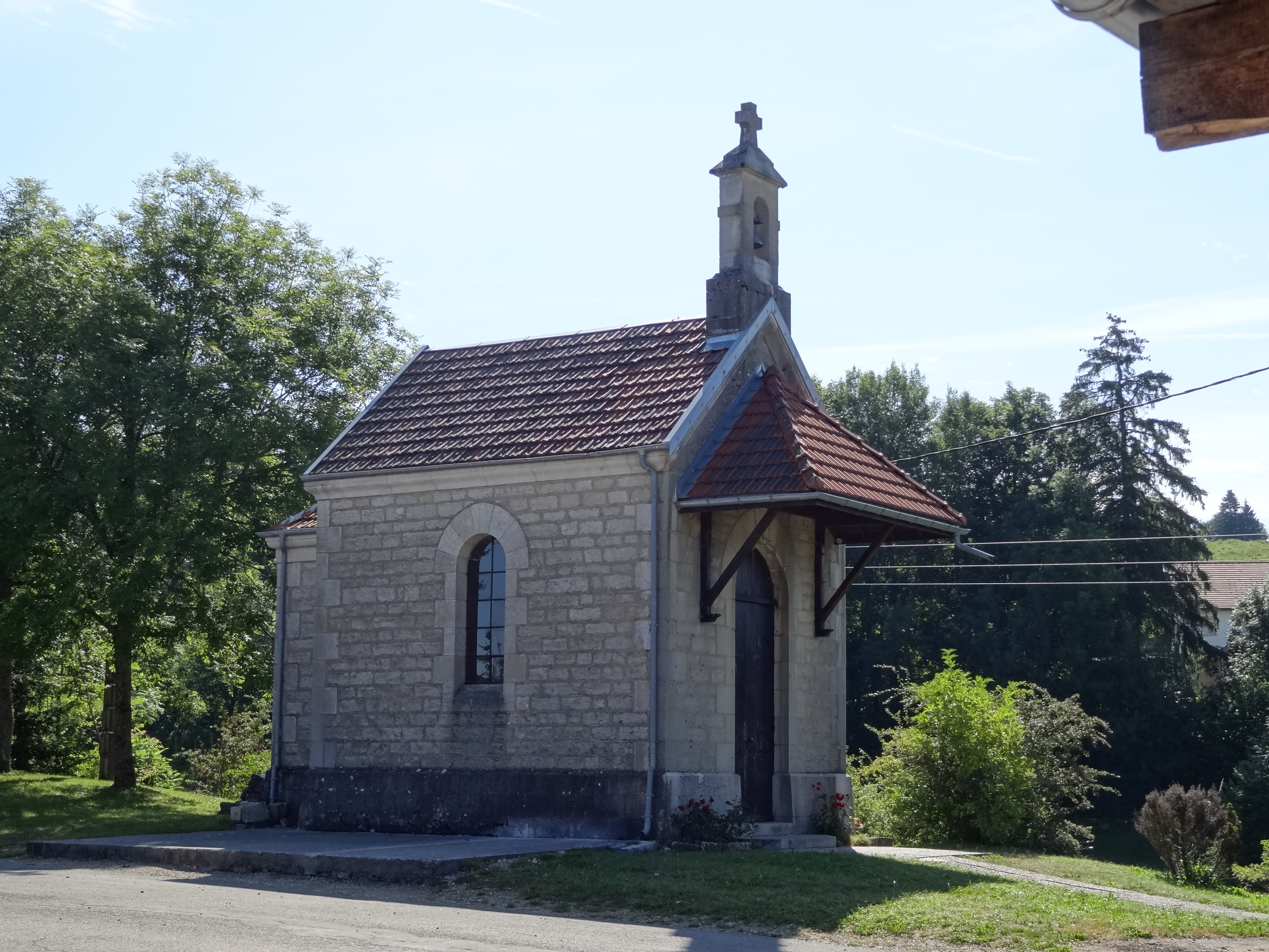 Montperreux (Doubs), lieu-dit "le Pierreux" - chapelle de la vue du lac